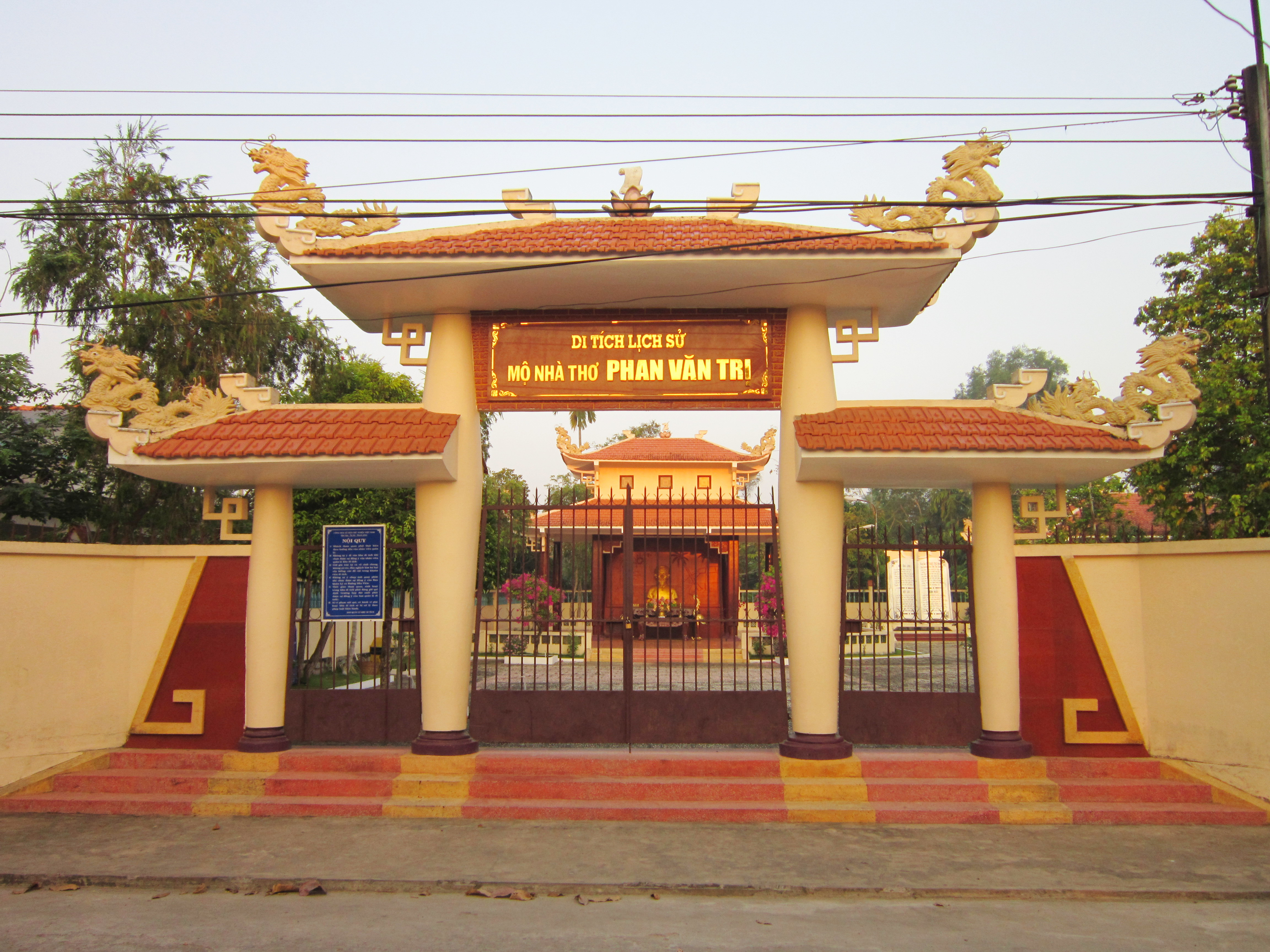 Khu đền thờ và mộ nhà thơ Phan Văn Trị (1830-1910) ở Phong Điền, thành phố Cần Thơ, Việt Nam.